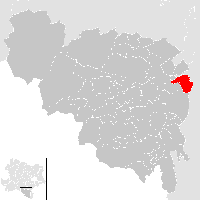 Bezirk Neunkirchen